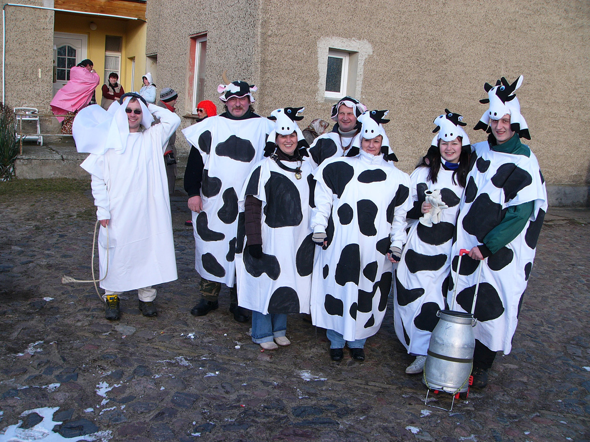 Ein Bild welches das Zampern heute bei uns im Dorf zeigt.